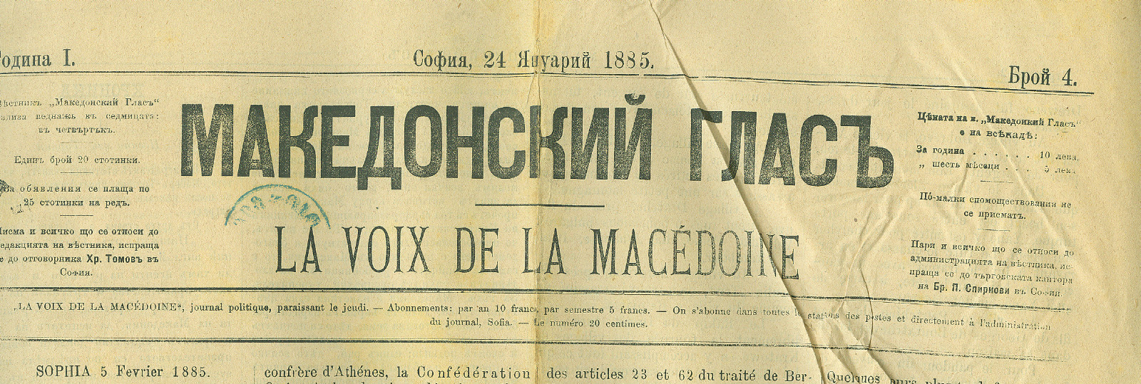 Вестник „Македонски глас“.